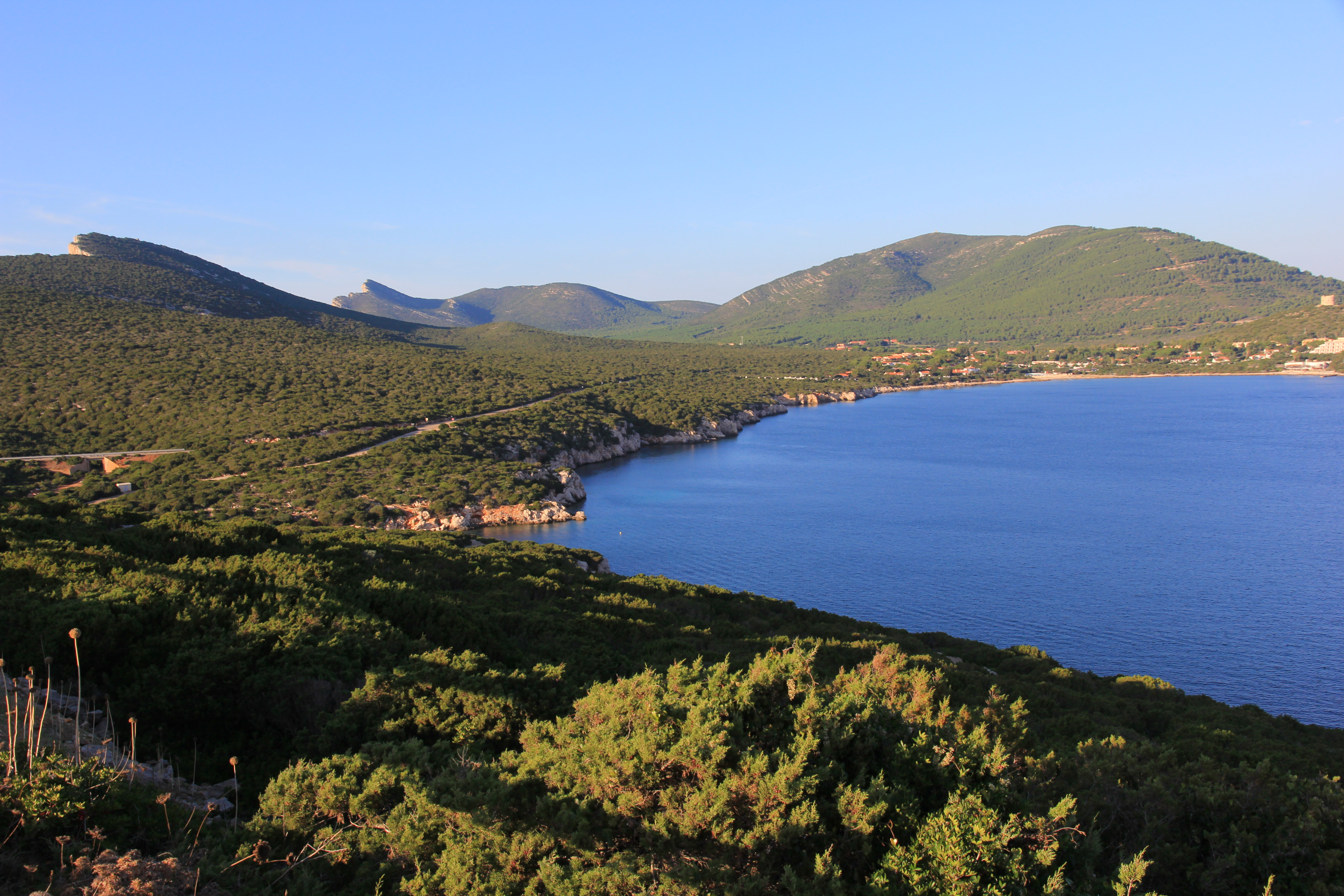 Alghero